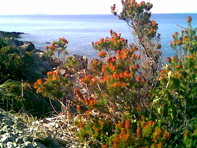 Riserva naturale Capo Gallo, Sicily